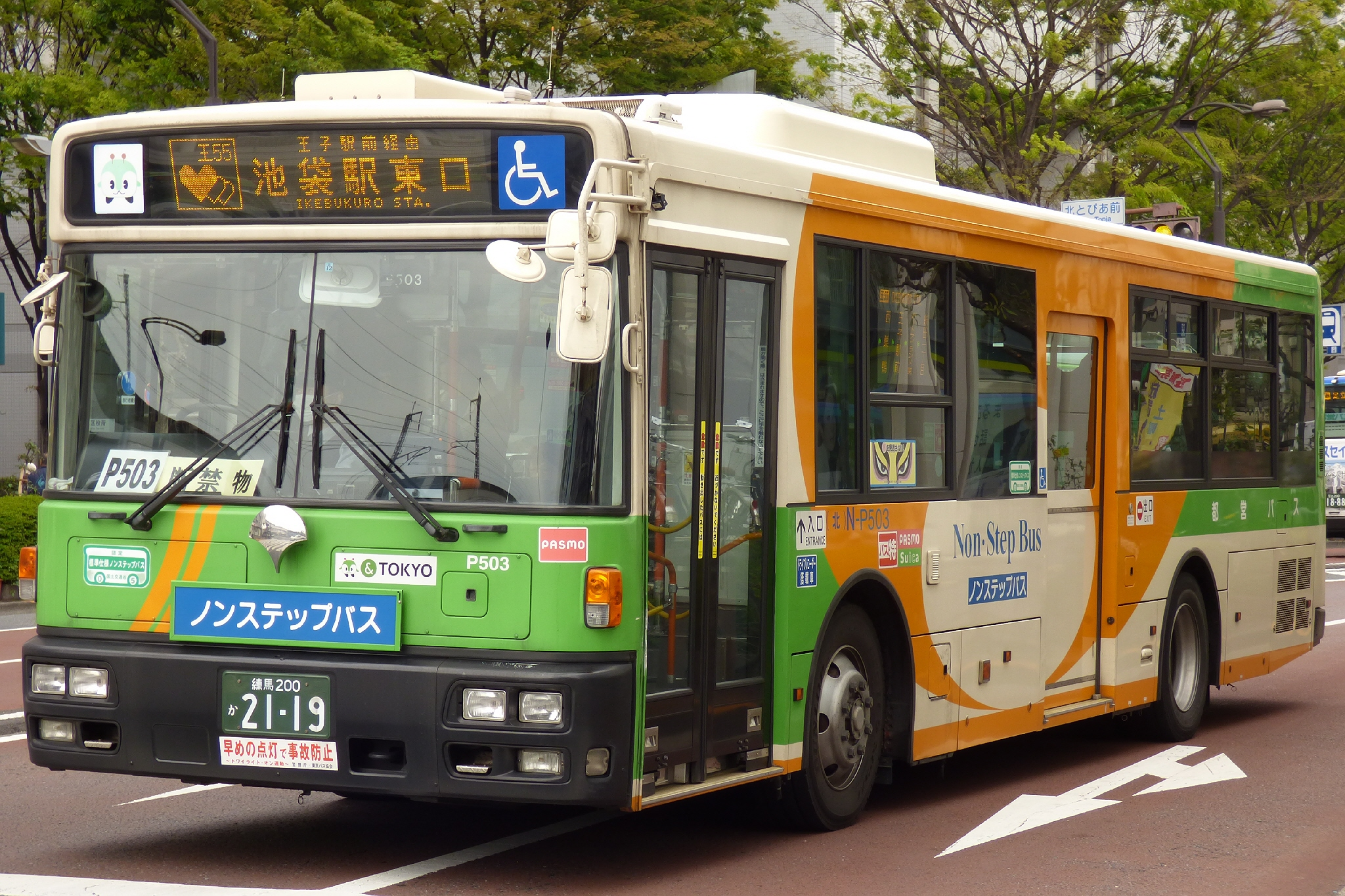 都営バス北営業所の日産ディーゼル・スペースランナーRA(P503)